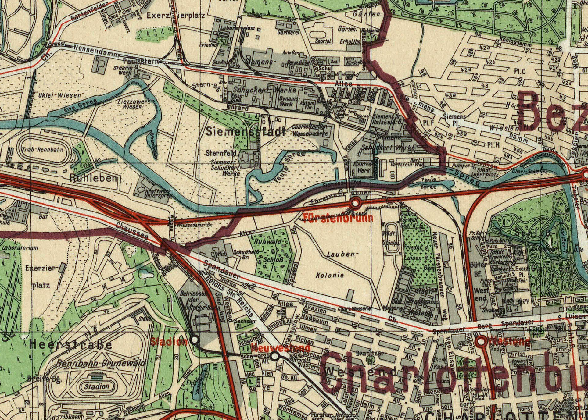 Silva-Übersichtsplan von der Stadt Berlin und ihren 20 Verwaltungsbezirken : auf Grund des Gesetzes vom 27. April 1920 / bearb. und hrsg. von Willy Holz * Format: ca 163 x 117 cm * Orientierung: Nord * Maßstab: 1: 30 000 (Innenstadt 1: 20 000) * 2 Blätter, mehrfarbig